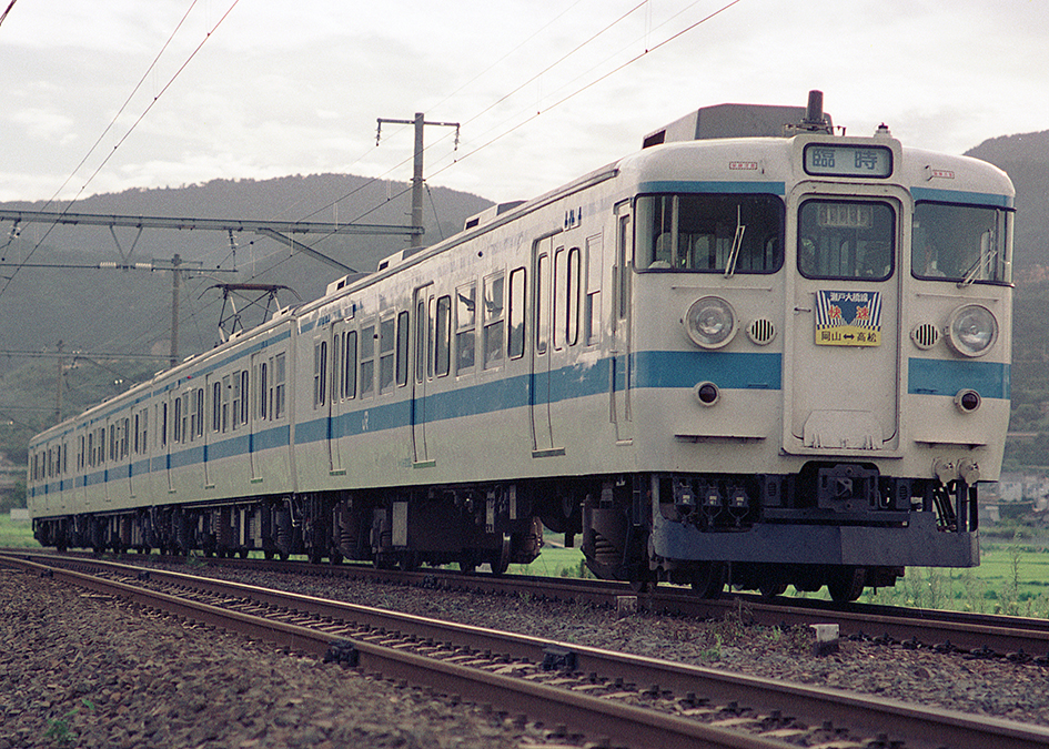 JR四国 111系近郊形電車 瀬戸大橋線 臨時快速 クハ111-3002